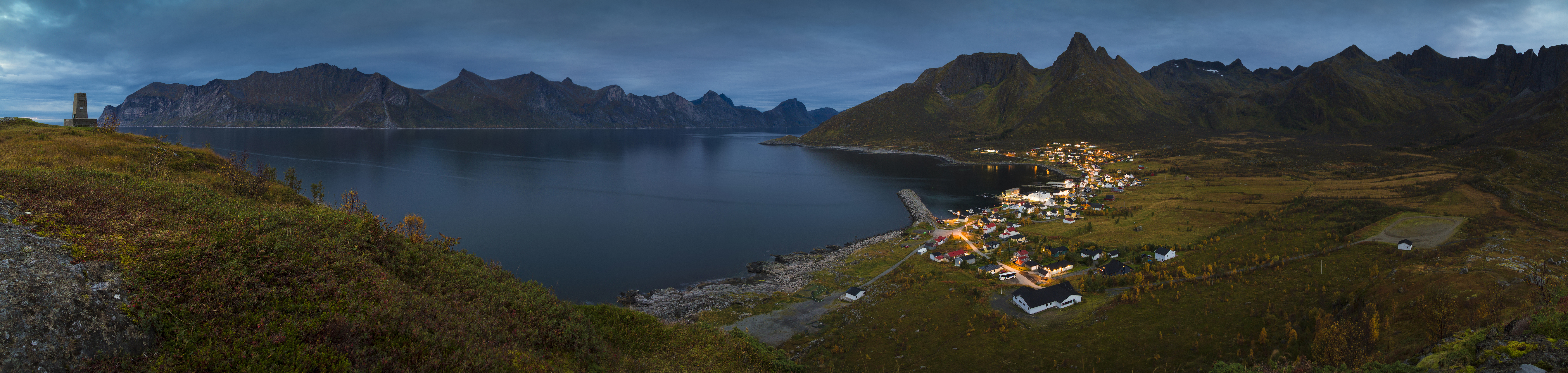 An evening view to Mefjordvær village and Mefjorden from Knuten, Senja, Troms, Norway in 2015 September.